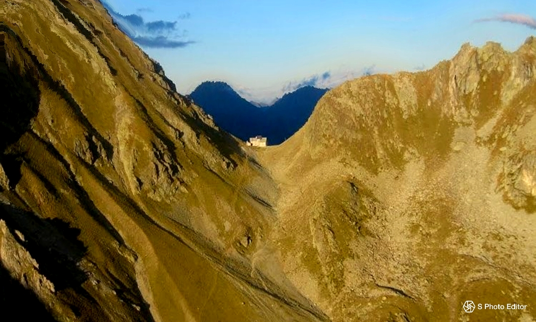 Colle alto 2480 m con rifugio Ospizio Sottile